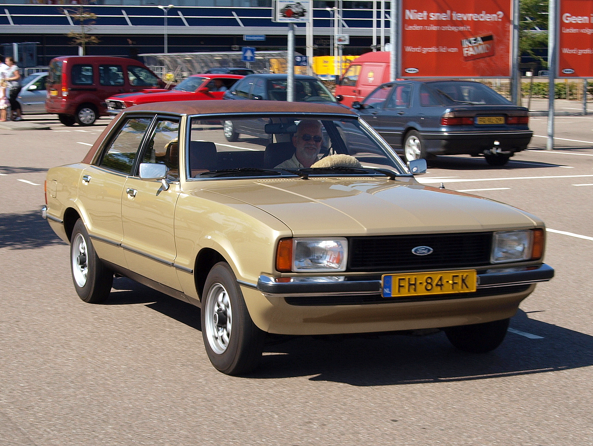 Ford Taunus 1600 GL FH-84-FK